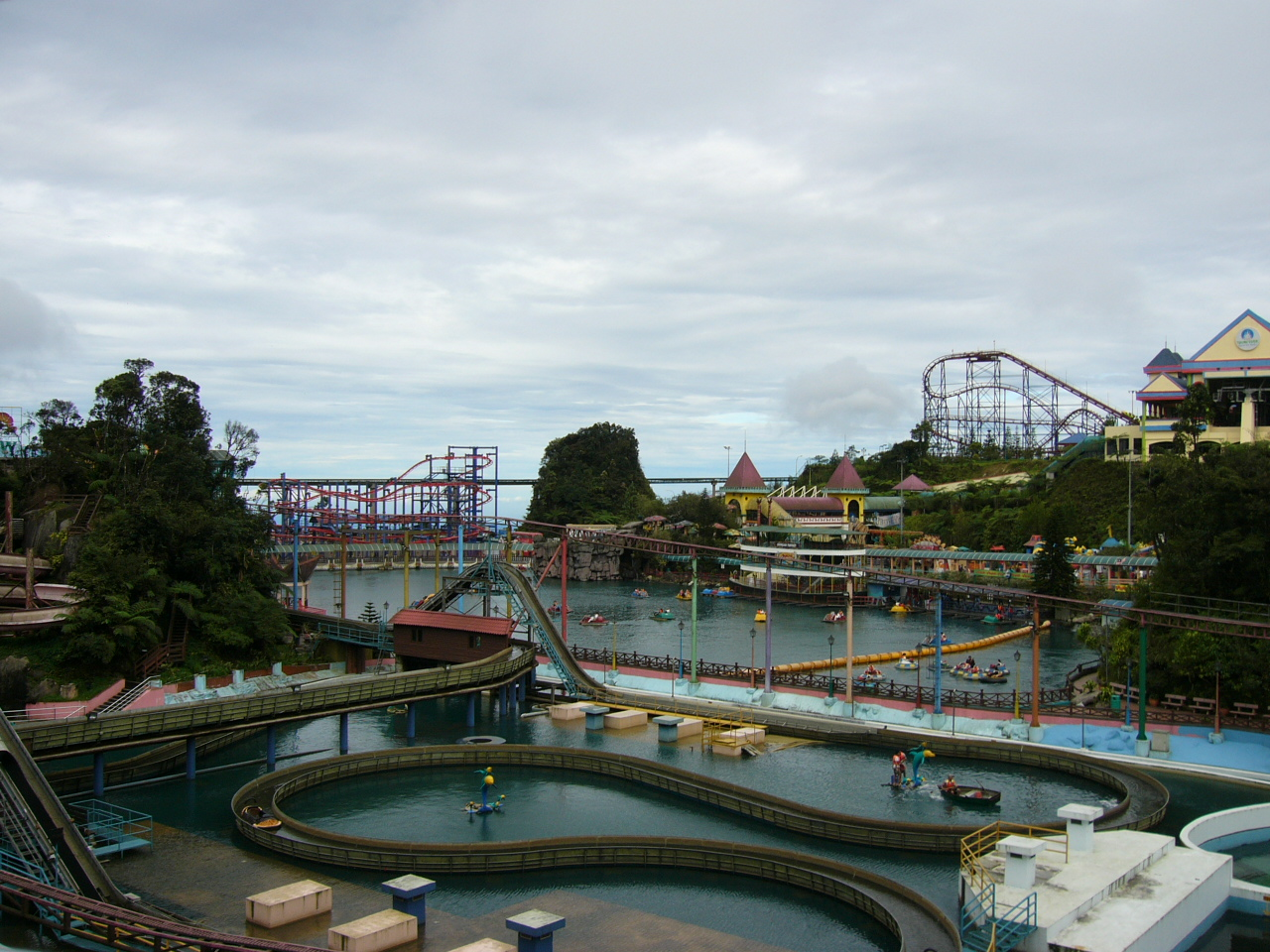 Malaysia Genting Highland